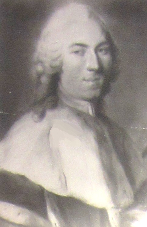 Description Laurent de Chazelles Date21 September 2011Sourcehôtel du département de la MoselleAuthorAimelaimePermission(Reusing this file) Laurent de Chazelles